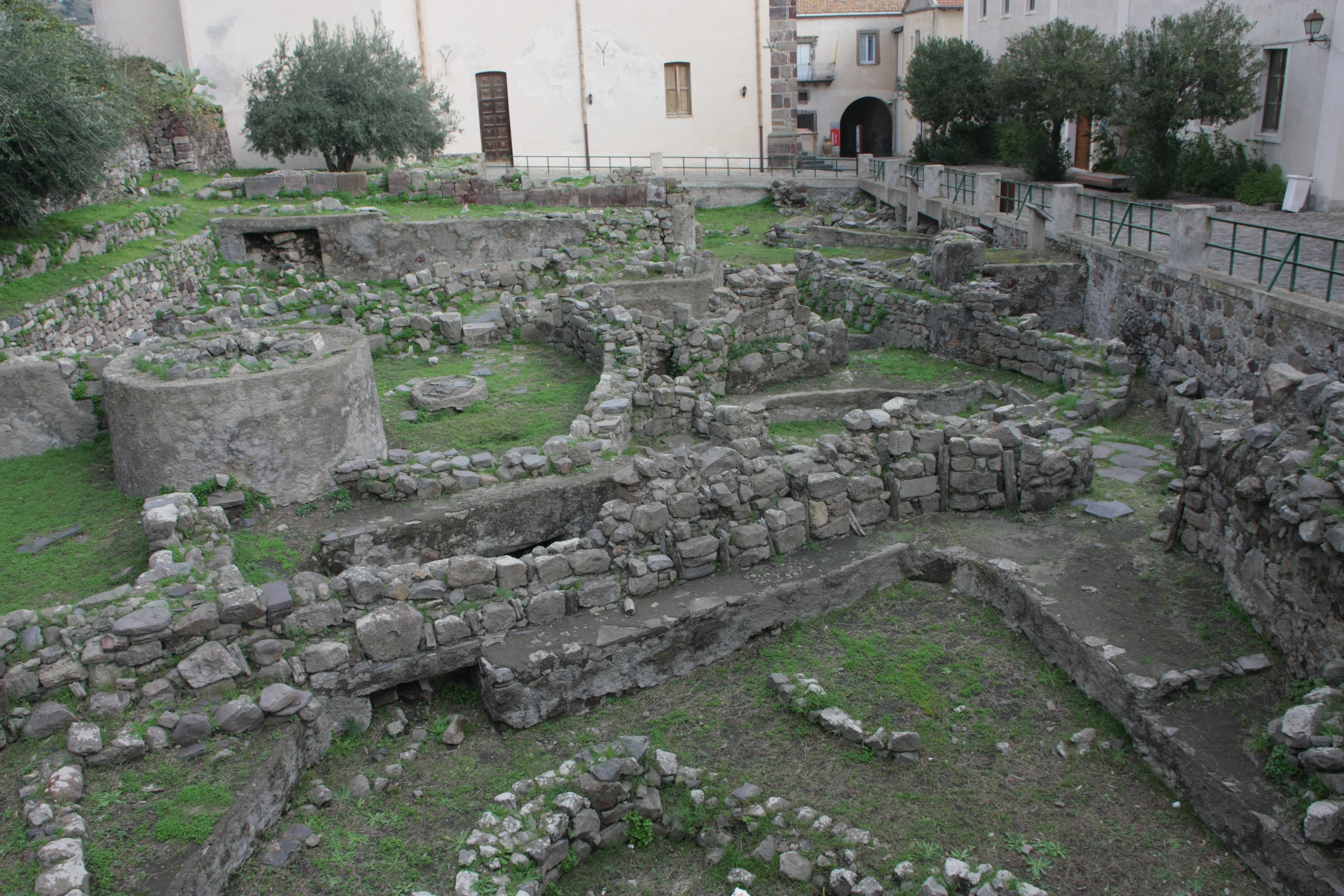 Villaggio preistorico, Lipari